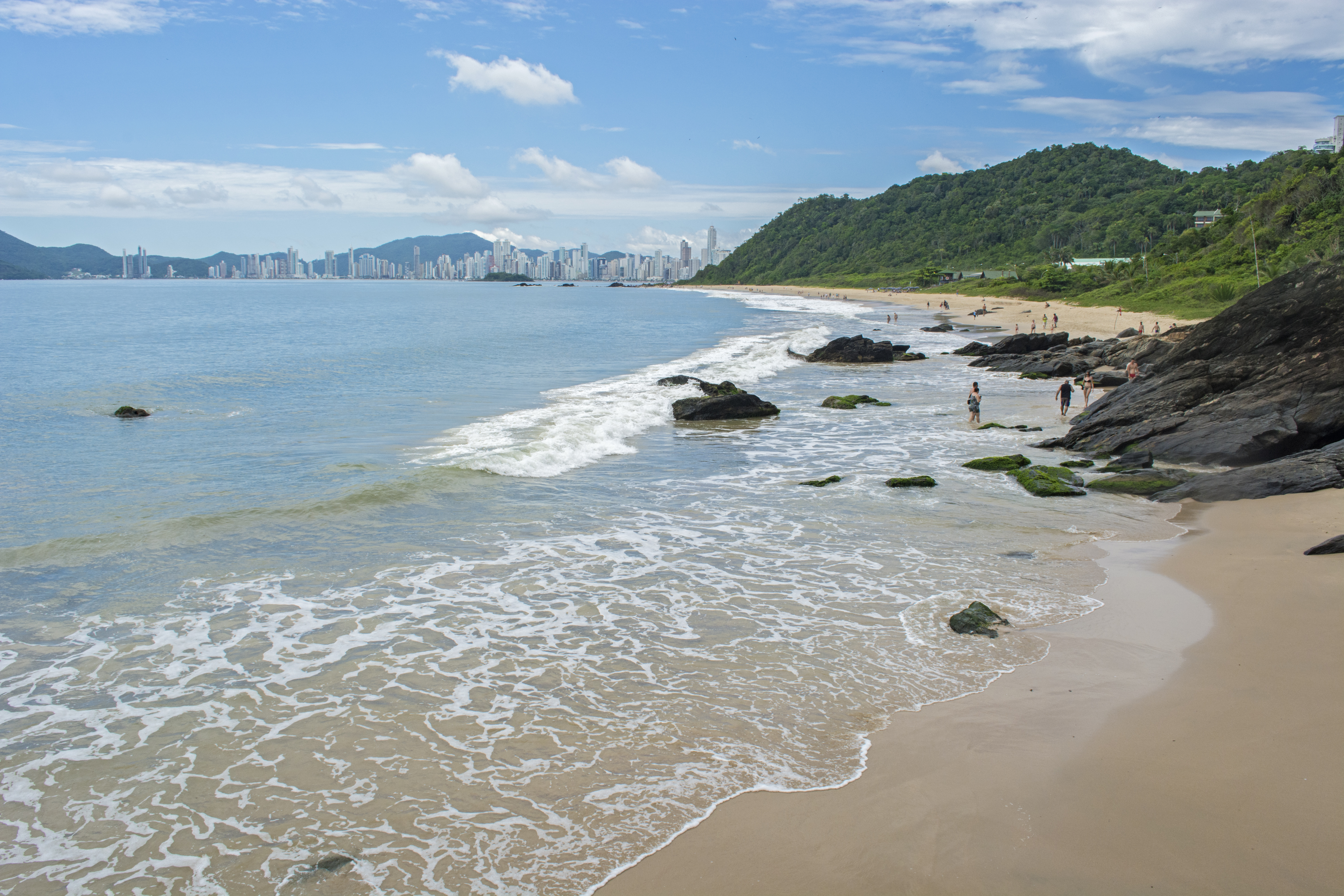 praia próxima à Balneário Camboriú,caracterizada por ondas altas e mar bravio,não muito frequentada pelos banhistas